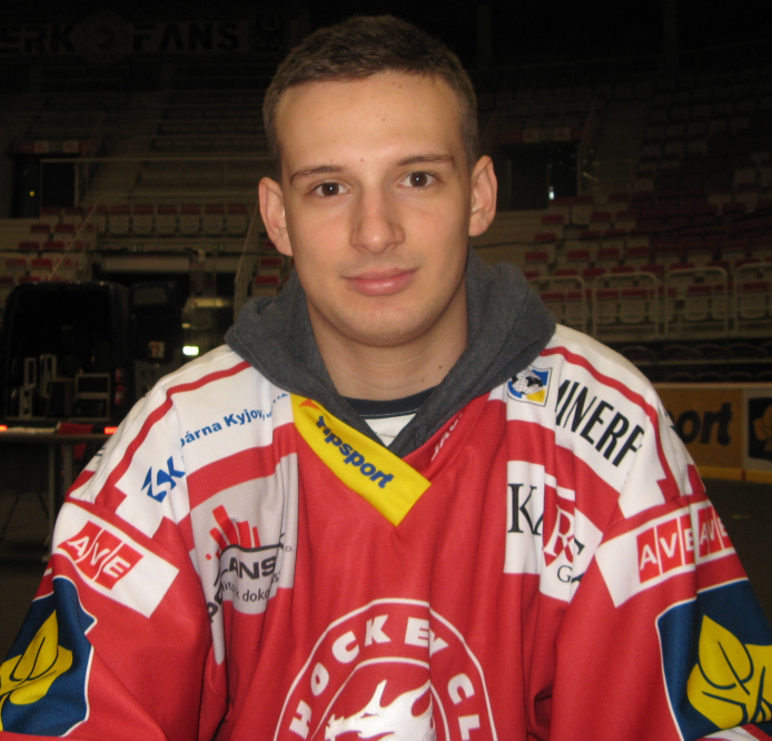 Po zakončení sezóny 2014/15 ve Werk Areně